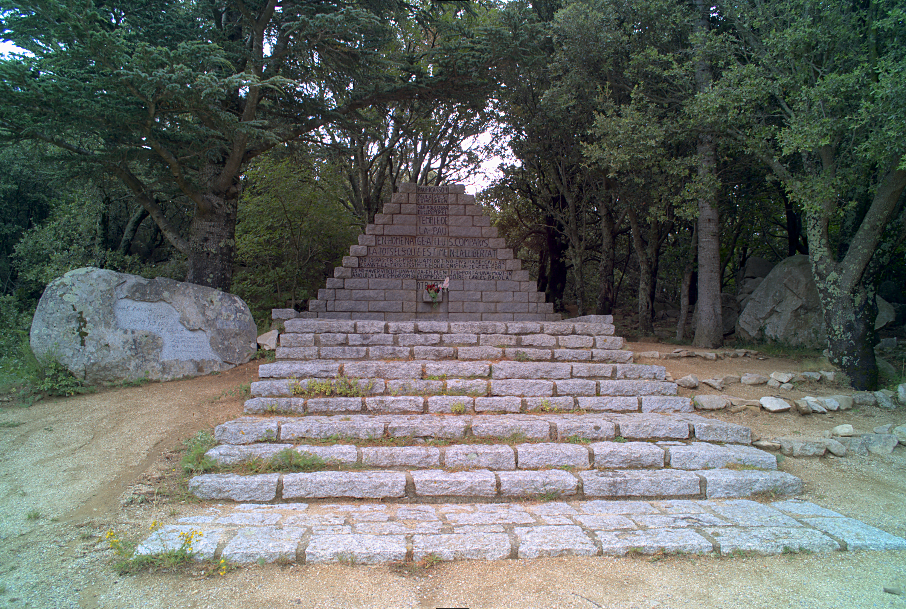 Monument à Lluís Companys, Col de Manrella, Maureillas-La-Illas (Pyrénées-Orientales, Languedoc-Roussillon, France), Agullana (Haut-Ampurdan, Gérone, Catalogne, Espagne)